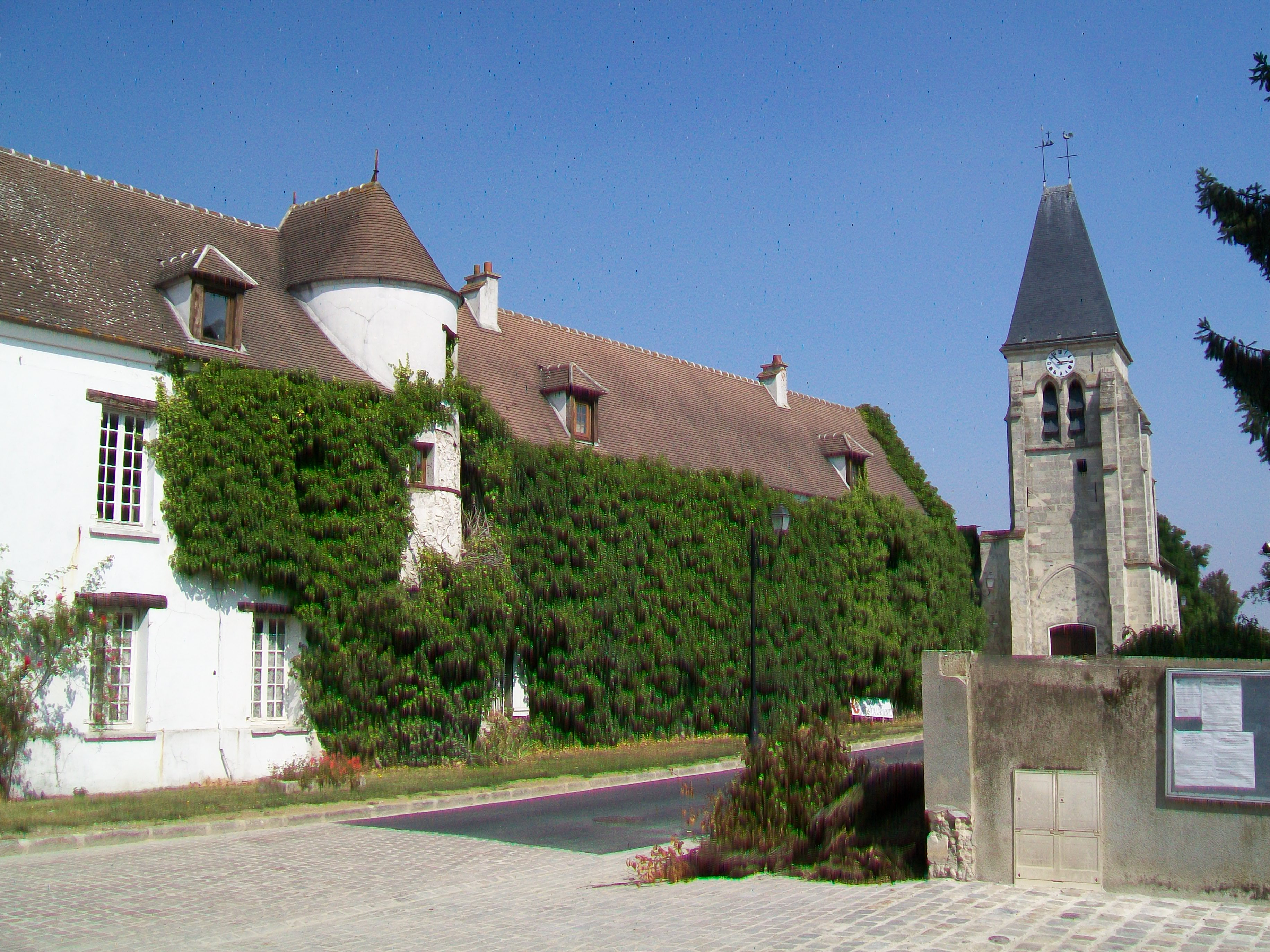 L'ancienne ferme du Manoir ; au fond à droite, l'église.